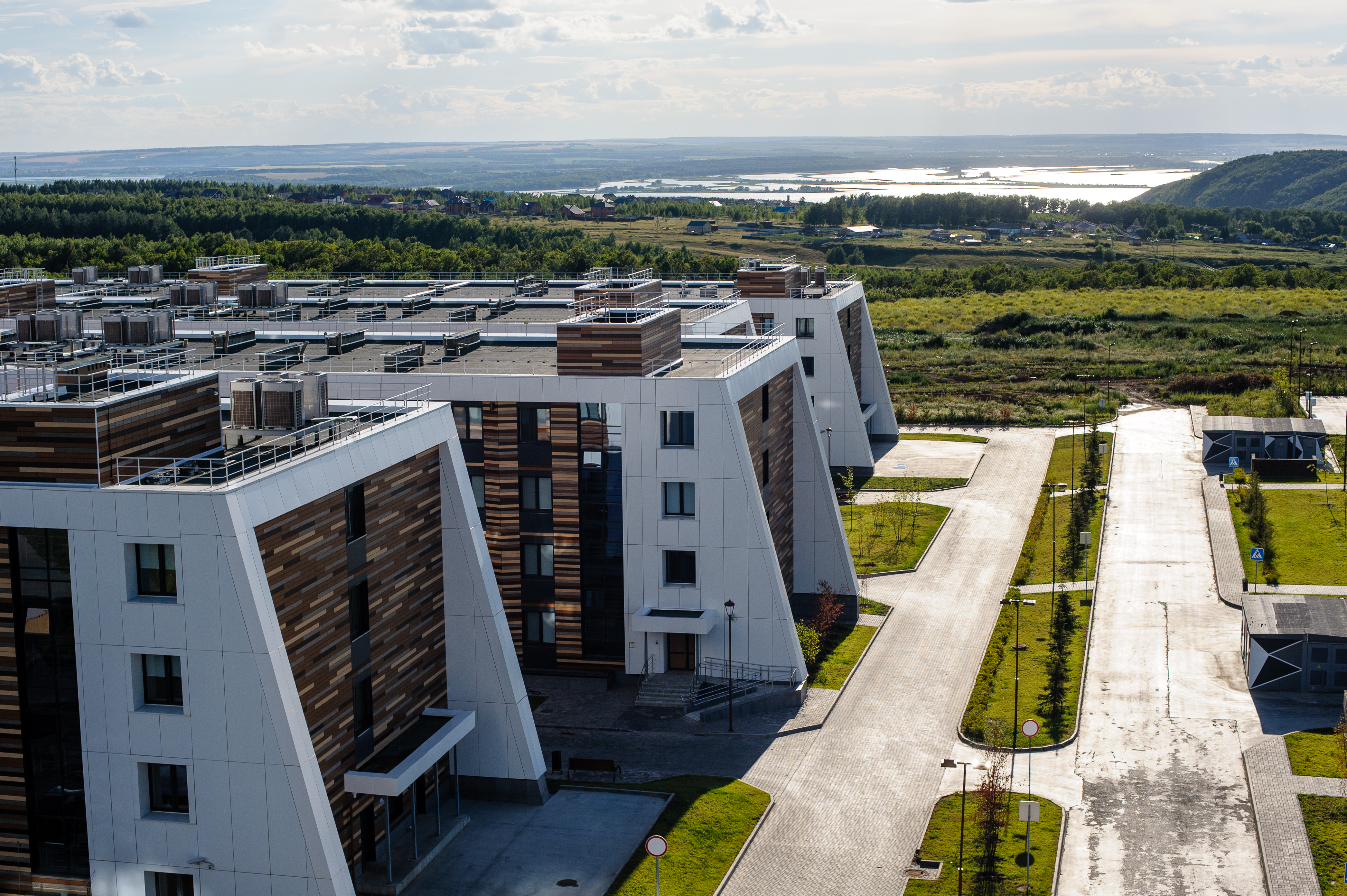 Вид на университетский кампус в Иннополисе и Свиягу